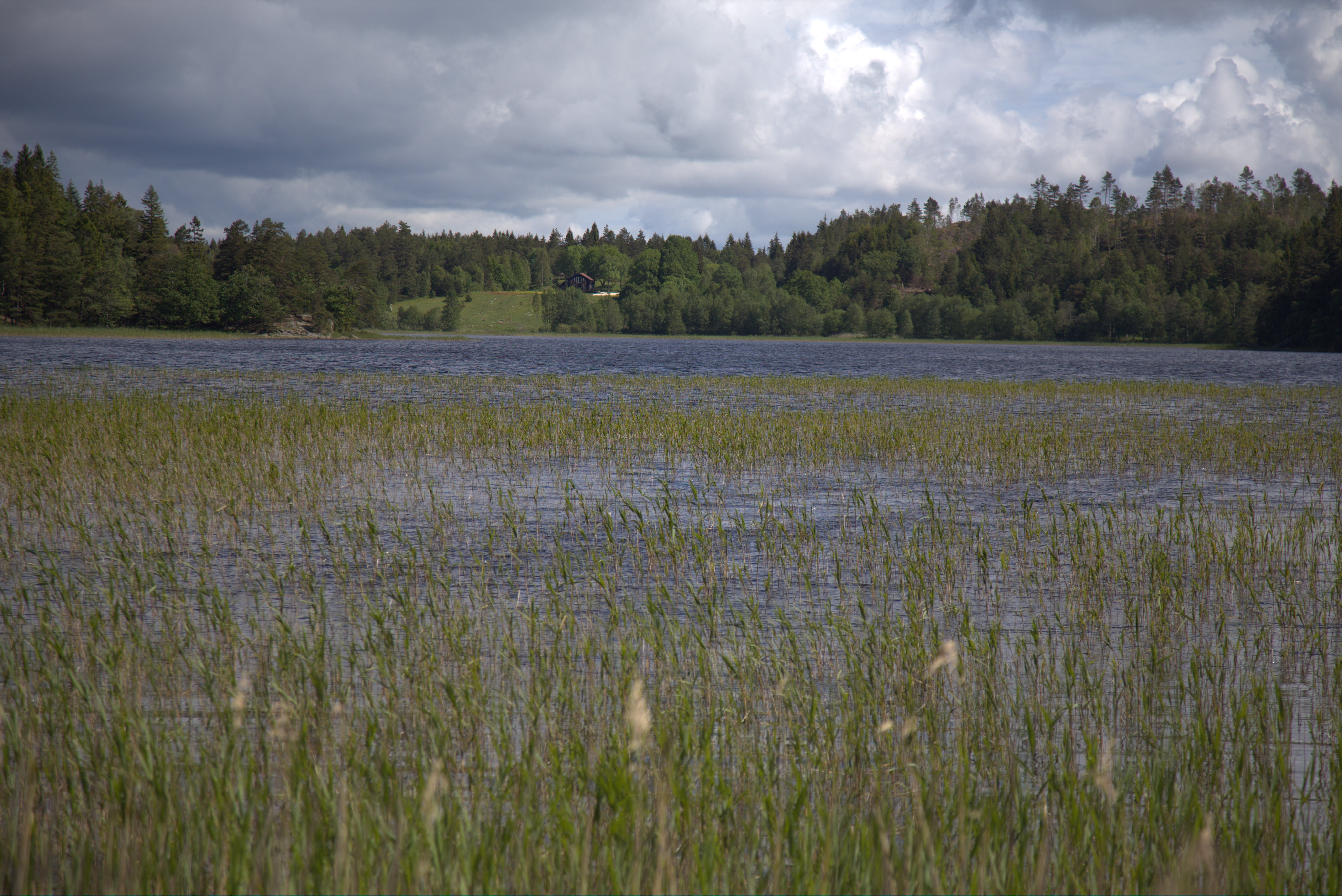 Stora Bjurevatten. Vy mot norr.